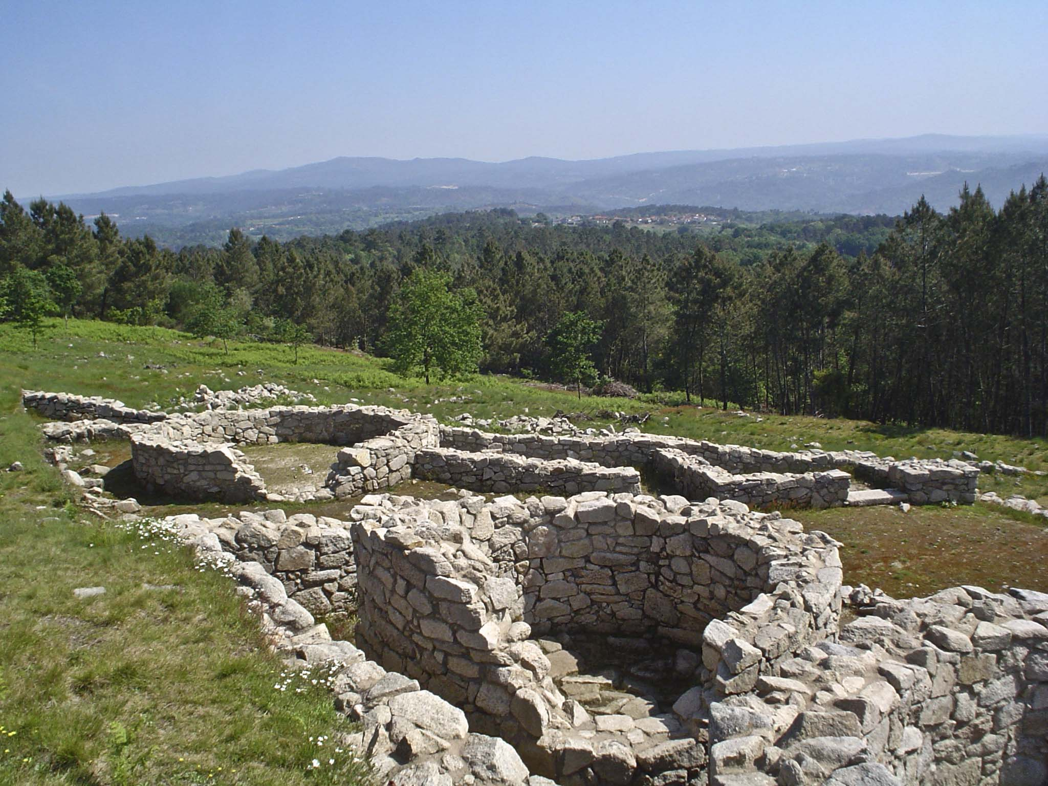 Barrio leste lado norte detalle do Castro de San Cibrao de Las